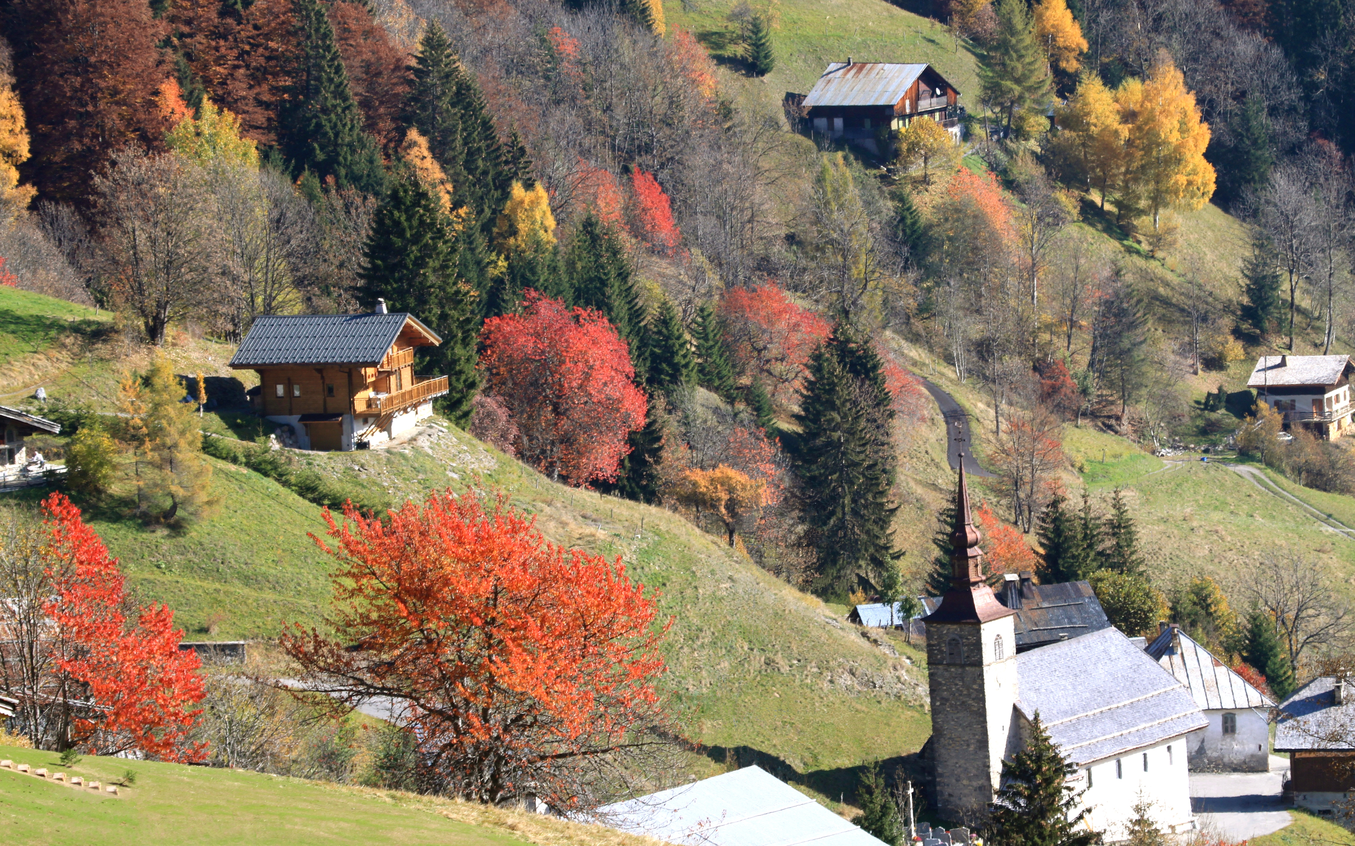 Vue du hameau de Chaucisse Commune de Saint-Nicolas-la-Chapelle (Savoie) Octobre 2011